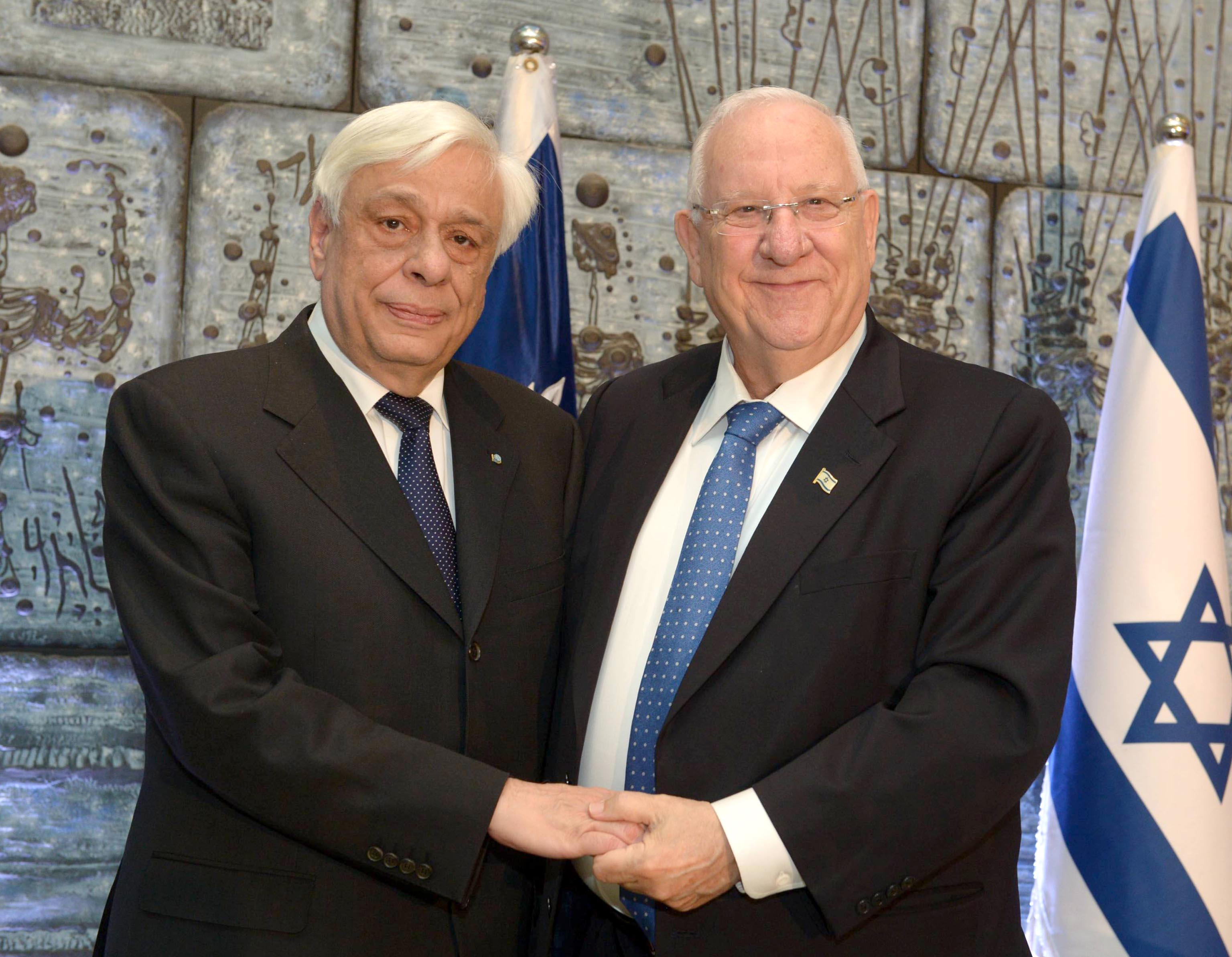 נשיא מדינת ישראל ראובן ריבלין מארח את נשיא יוון פרוקופיס פוולופולוס בעת ביקורו במדינת ישראל